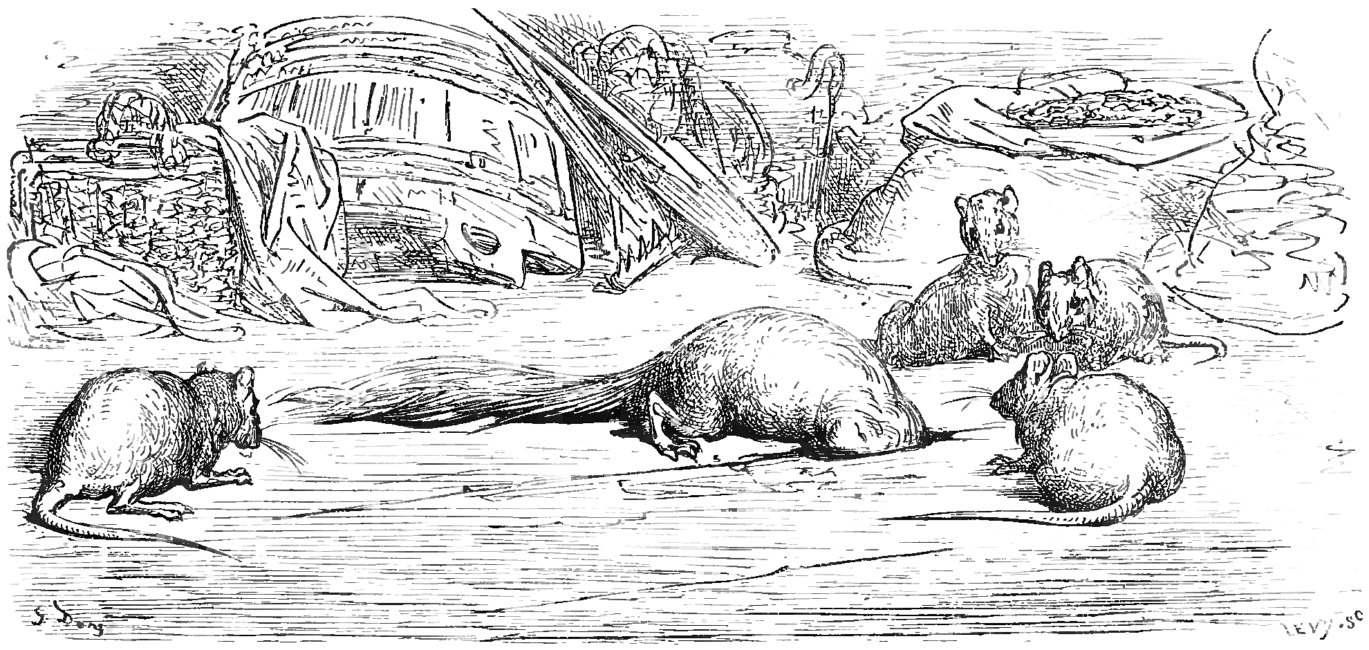 grafika z książki PL Bajki, Jean de La Fontaine, nakładem i drukiem Jana Noskowskiego, Warszawa 1876